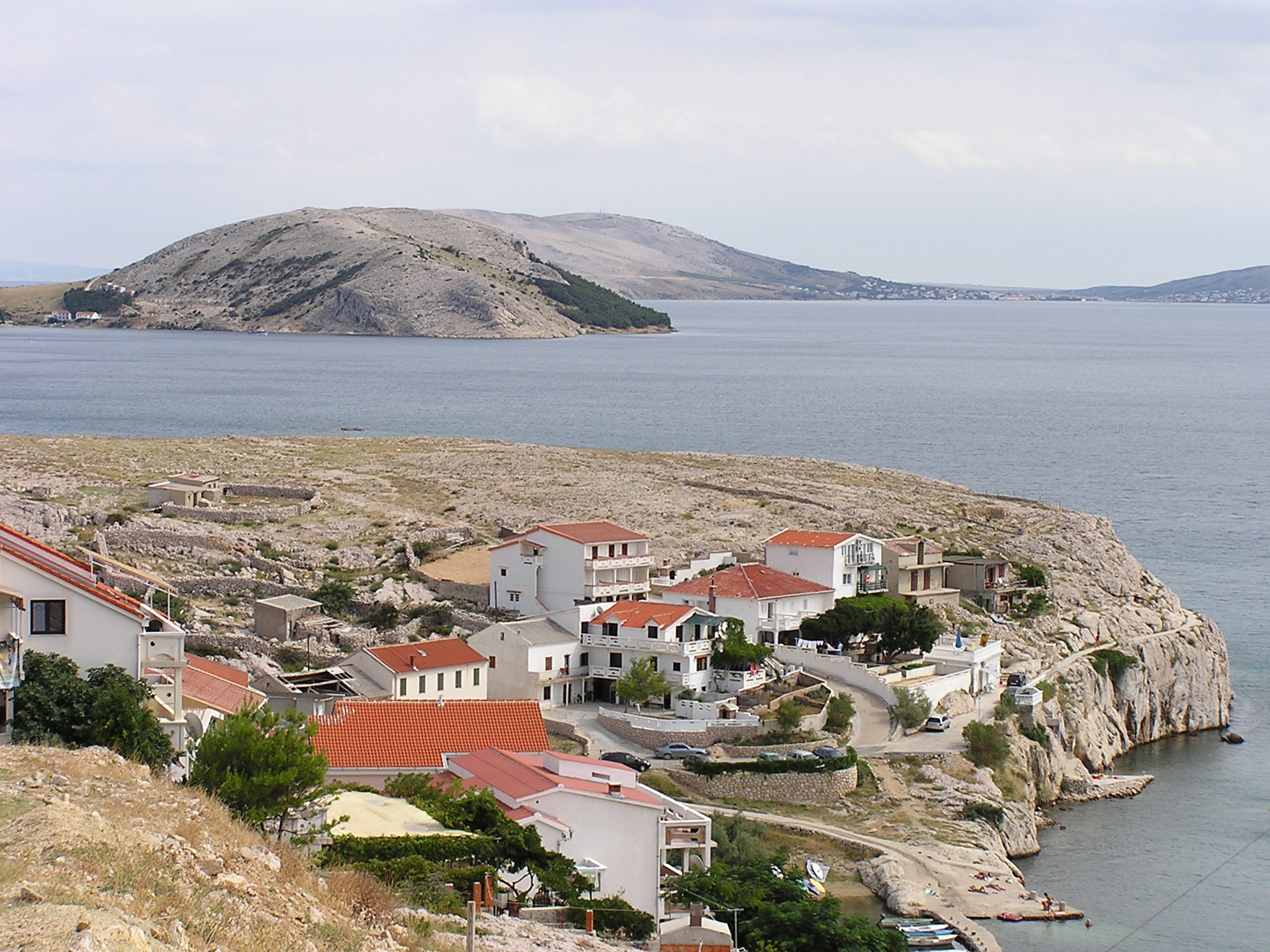 Island Pag